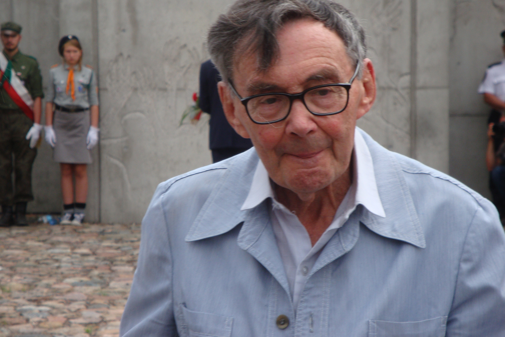 Marian Turski Ocalały przemawia na Stacji Radegast podczas uroczystości 72. rocznicy likwidacji Litzmannstadt Getto 29 sierpnia 2016